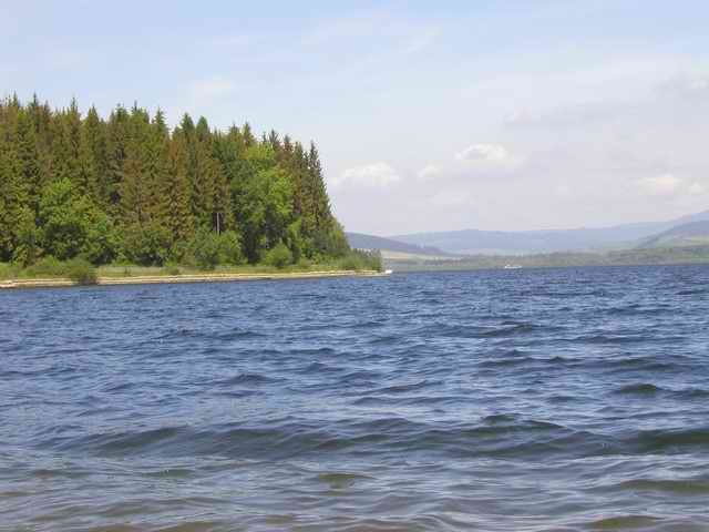 Oravska priehrada